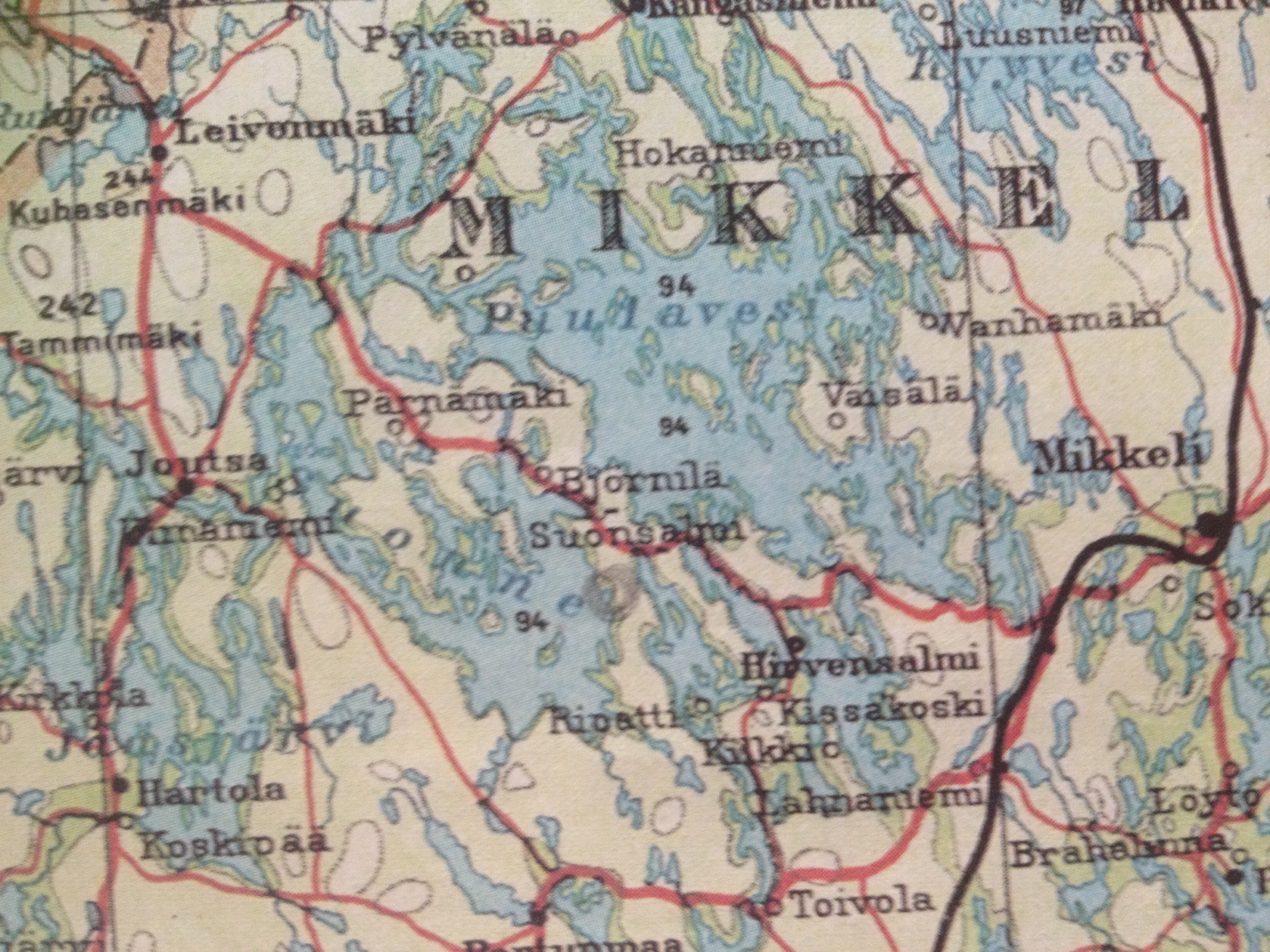 Poiminta vuoden 1933 kartasta